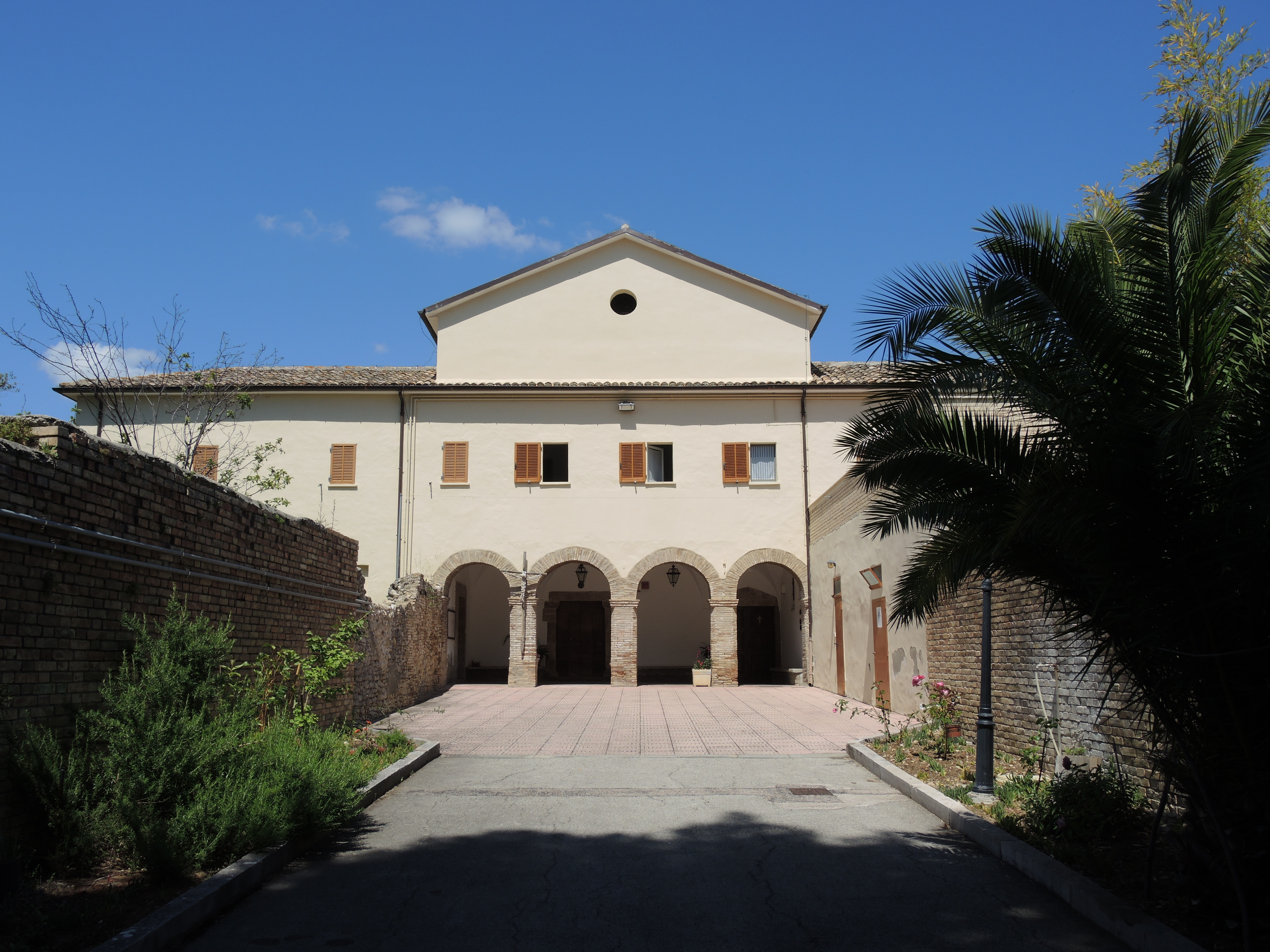 Lanciano - Complesso Conventuale San Bartolomeo